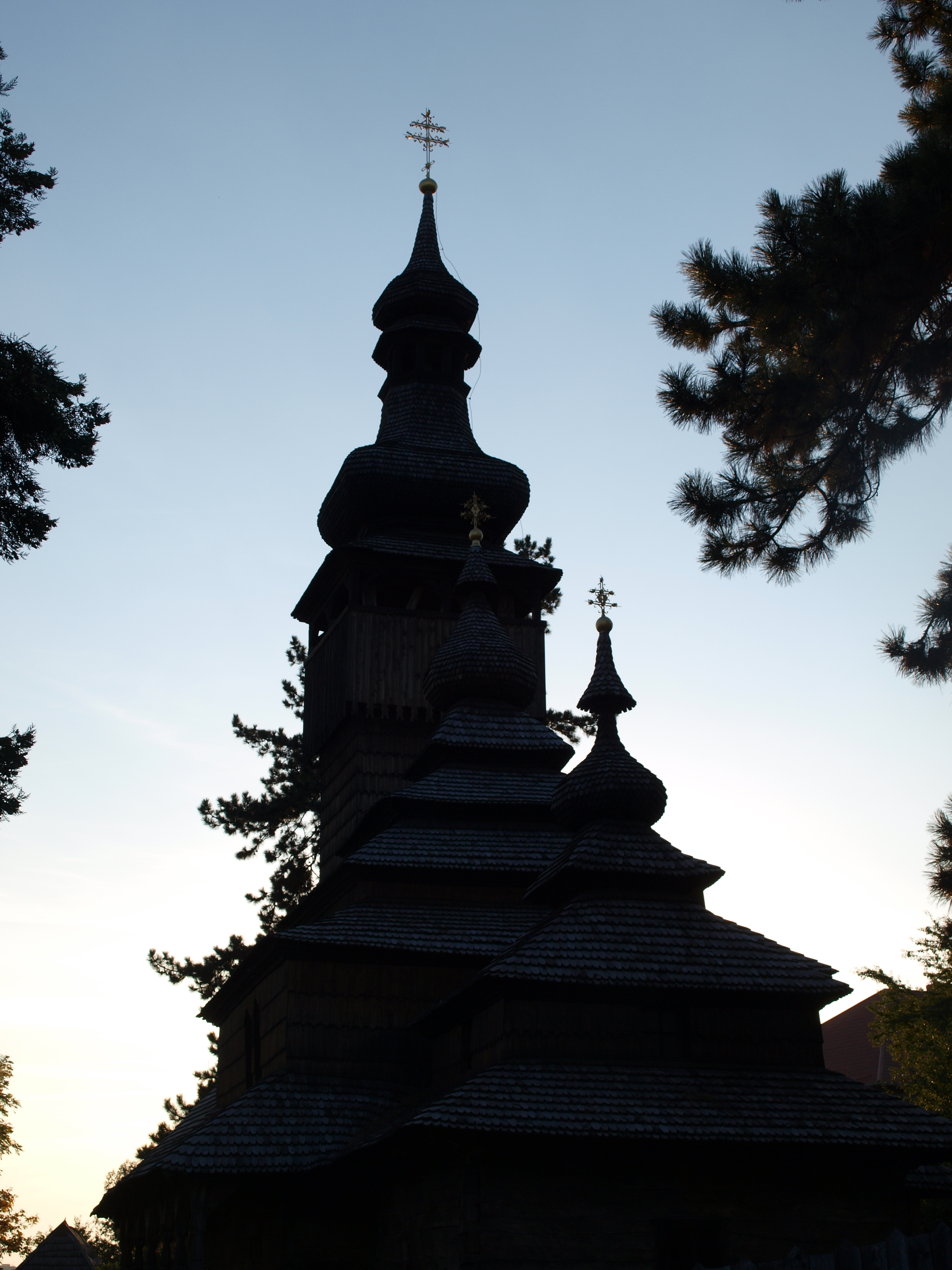 Закарпатський музей народної архітектури та побуту — музей просто неба в місті Ужгород (Україна), складається з архітектурних пам'яток старовинного закарпатського села і зразків найдавніших і найбільш розповсюджених видів народного прикладного мистецтва. Почав створюватися в 1965 році, відкритий для відвідувачів у червні 1970 року займає площу 5,5 га, розташований поблизу території Ужгородського замку. У музеї представлені зразки житла і садиб закарпатців низинних районів (долинян, румунів і угорців), а також — горян (бойків і гуцулів). У музеї просто неба розміщені 7 садиб, 6 житлових будівель, церква, дзвіниця, школа, кузня, млин, корчма. У музеї зберігається понад 14 тисяч експонатів.